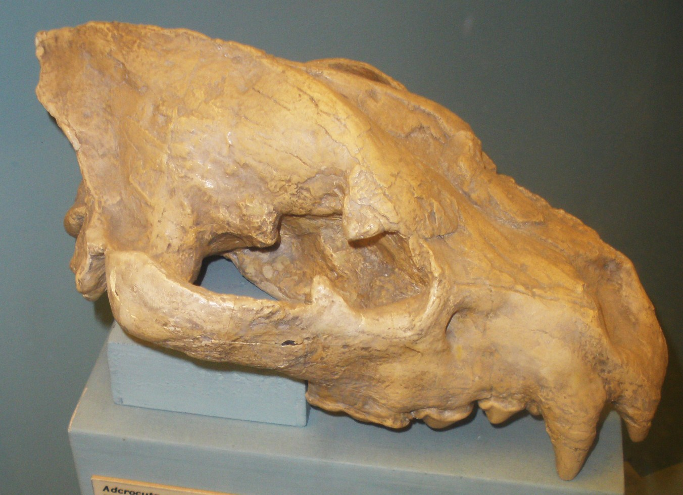 Fossil of Adcrocuta, an extinct mammal - Took the picture at Museo di Paleontologia di Firenze